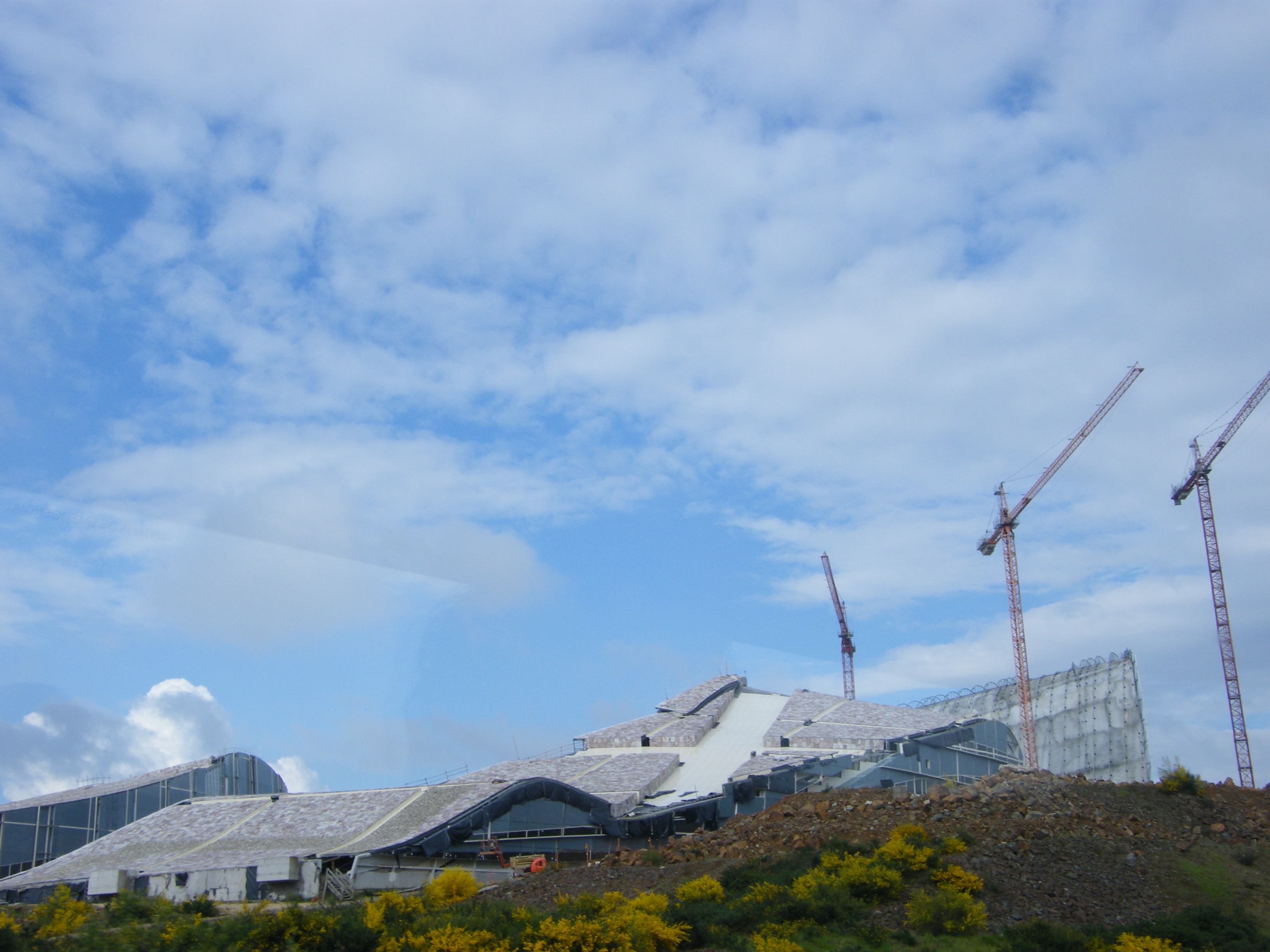 Ciudad de la Cultura, Santiago de Compostela. Galiza.